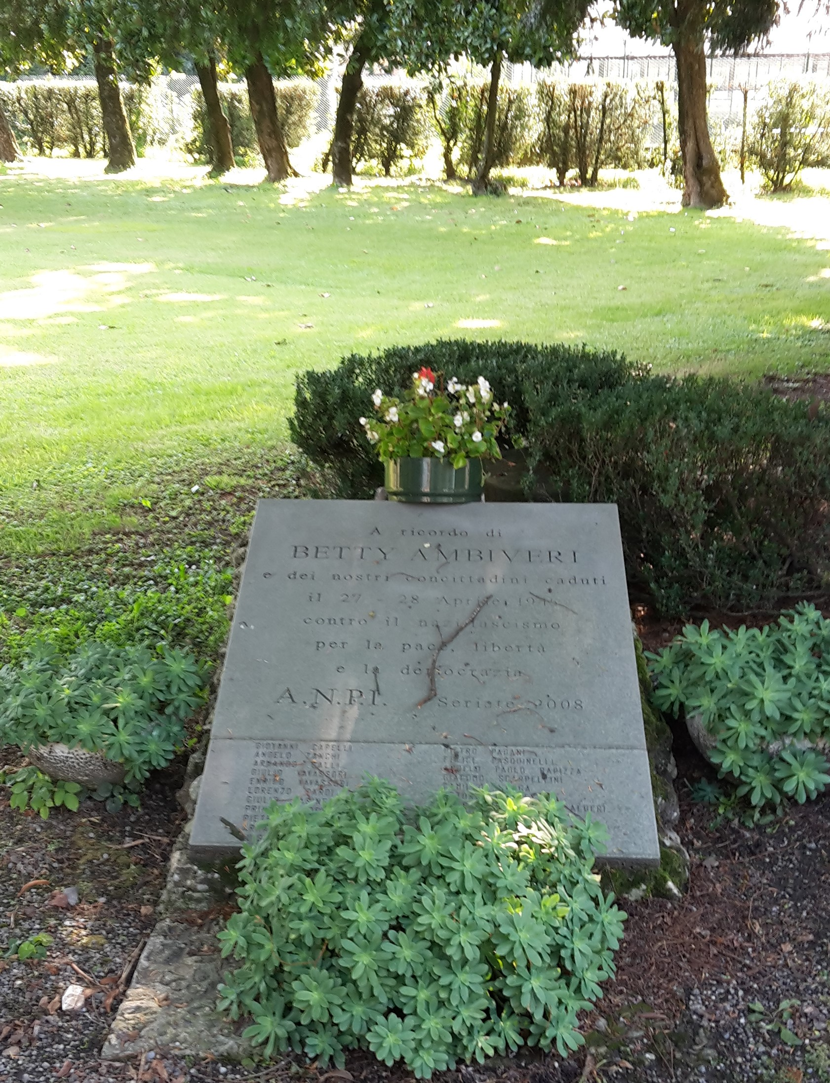 Lapide in ricordo da parte dell’A.N.P.I. all’entrata della Villa Ambiveri di Seriate